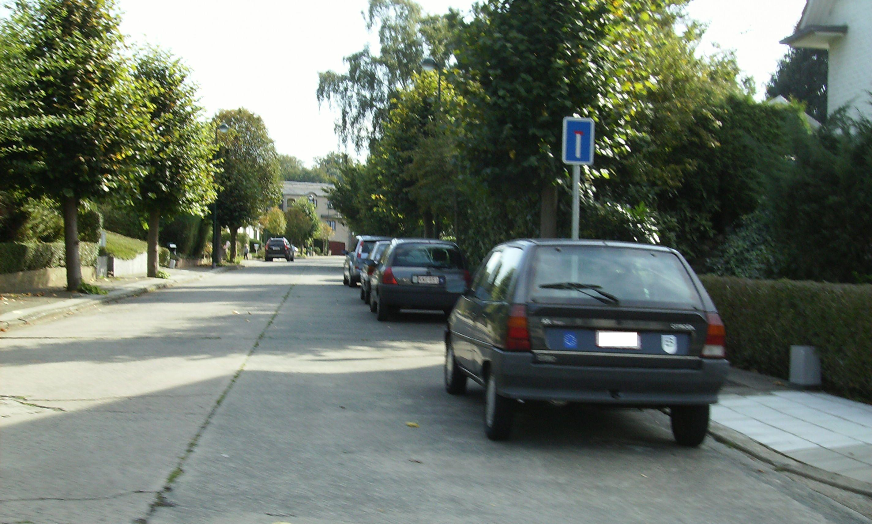 rue Charles Pas Auderghem